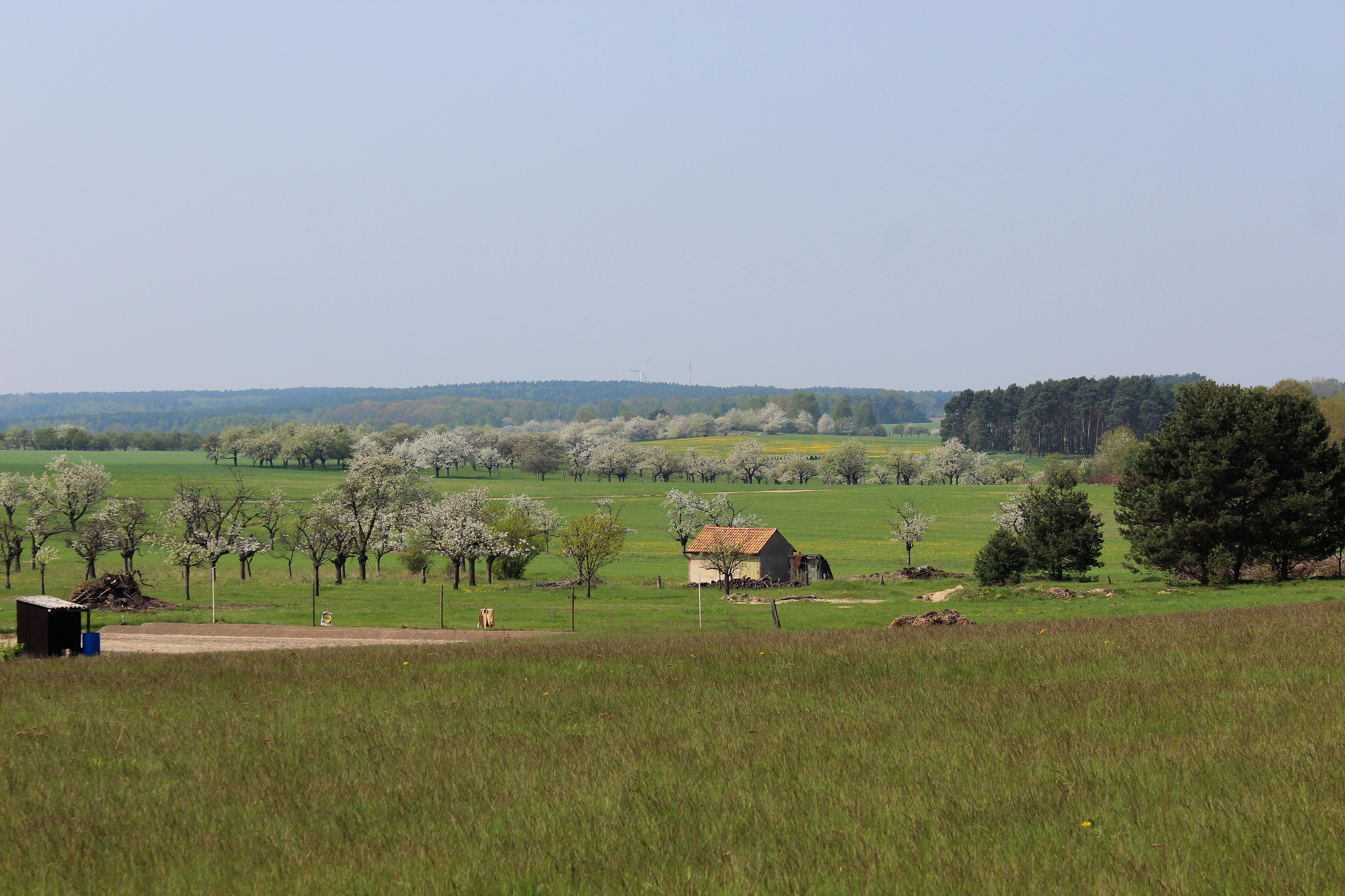 Streuobstwiesen bei Hohenleipisch im Naturpark Niederlausitzer Heidelandschaft.